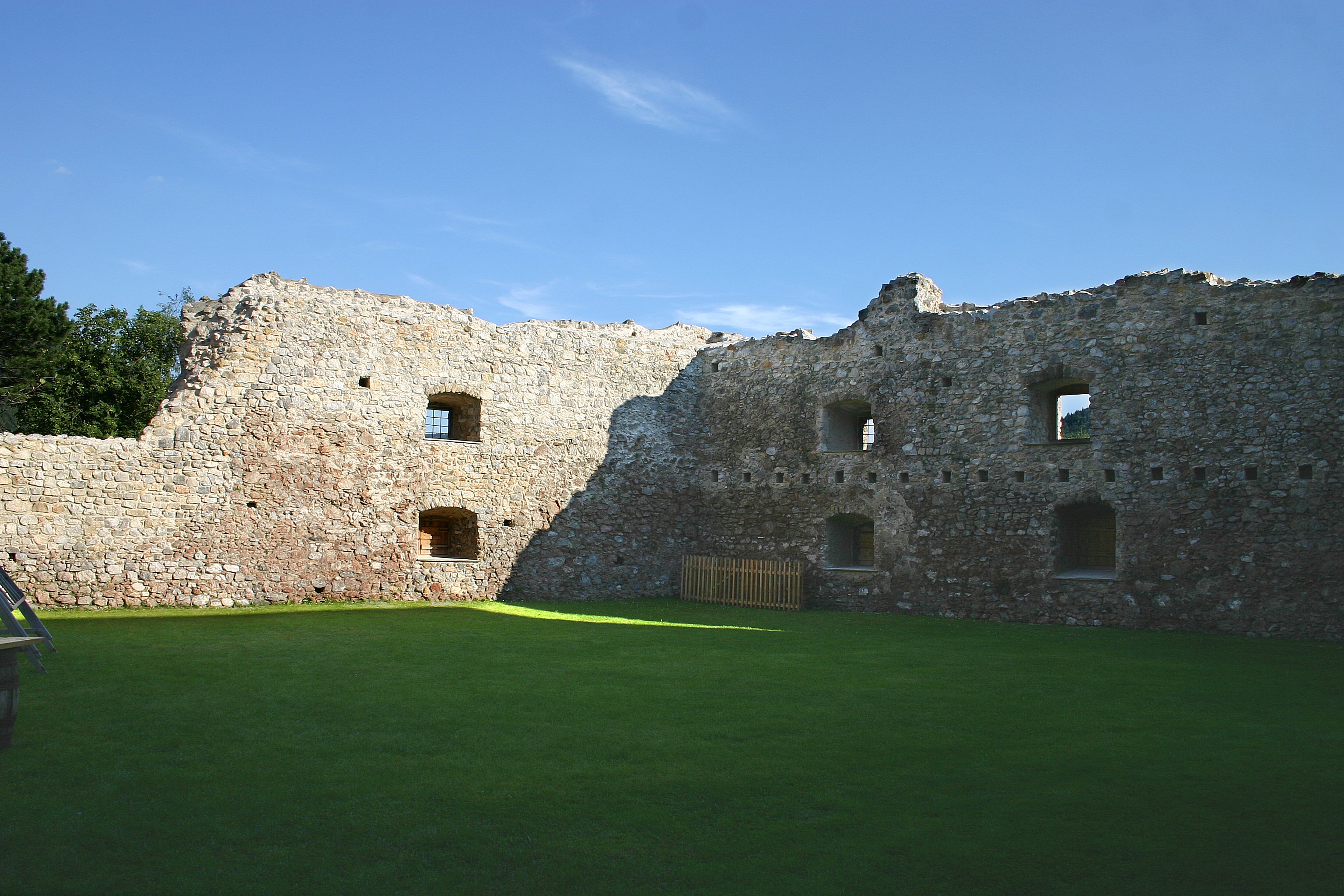 Puchberg am Schneeberg Burghof (Bild 2)